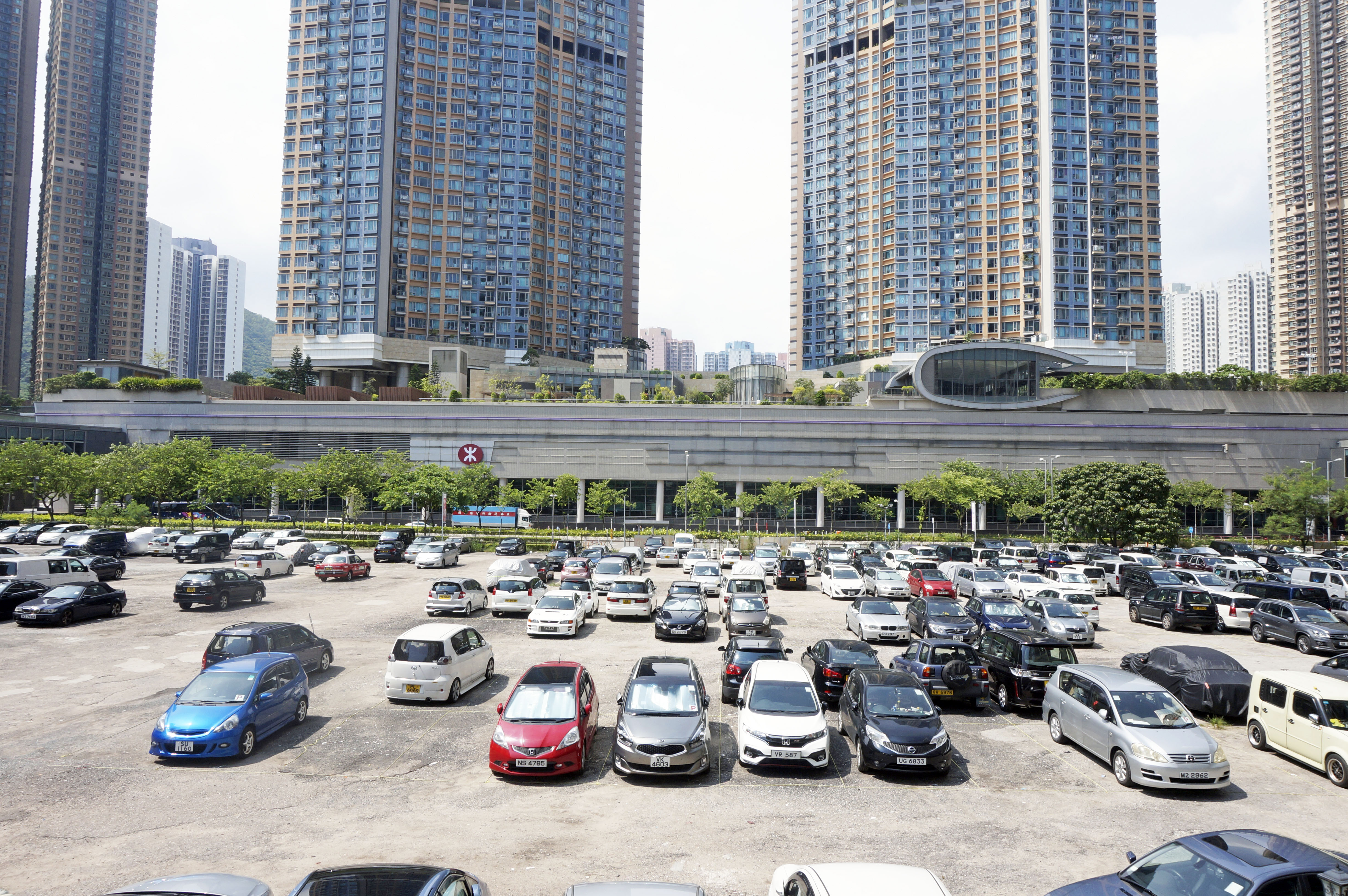 港鐵將軍澳站外觀